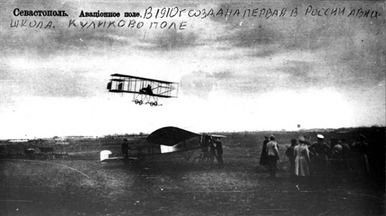 Первые полеты Севастопольской школы авиации (будущего Качинского училища)